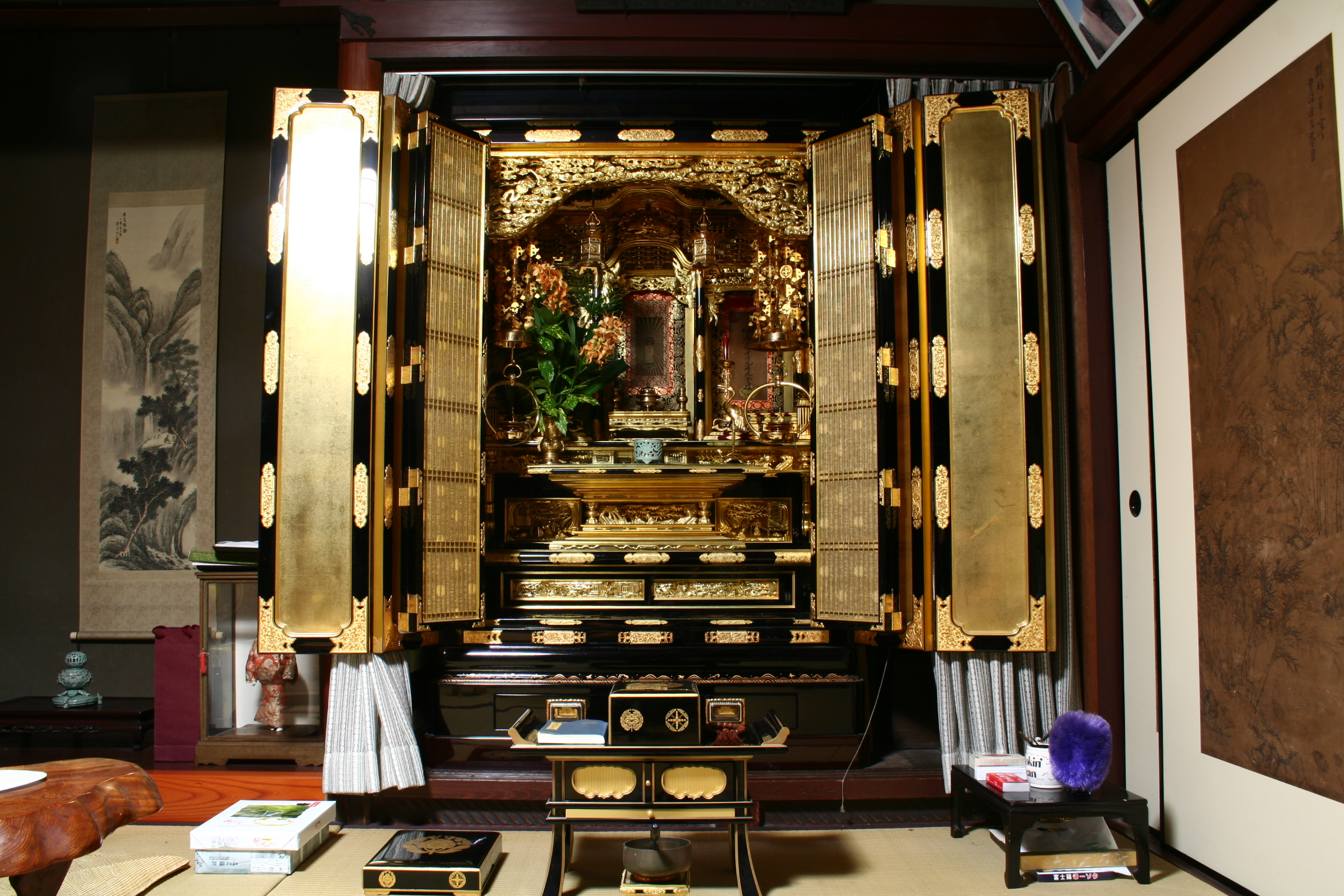 日本の仏壇。